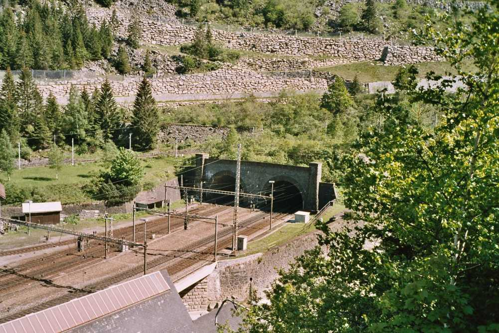 Die nördliche Einfahrt des Gotthardtunnels Traforo del San Gottardo.